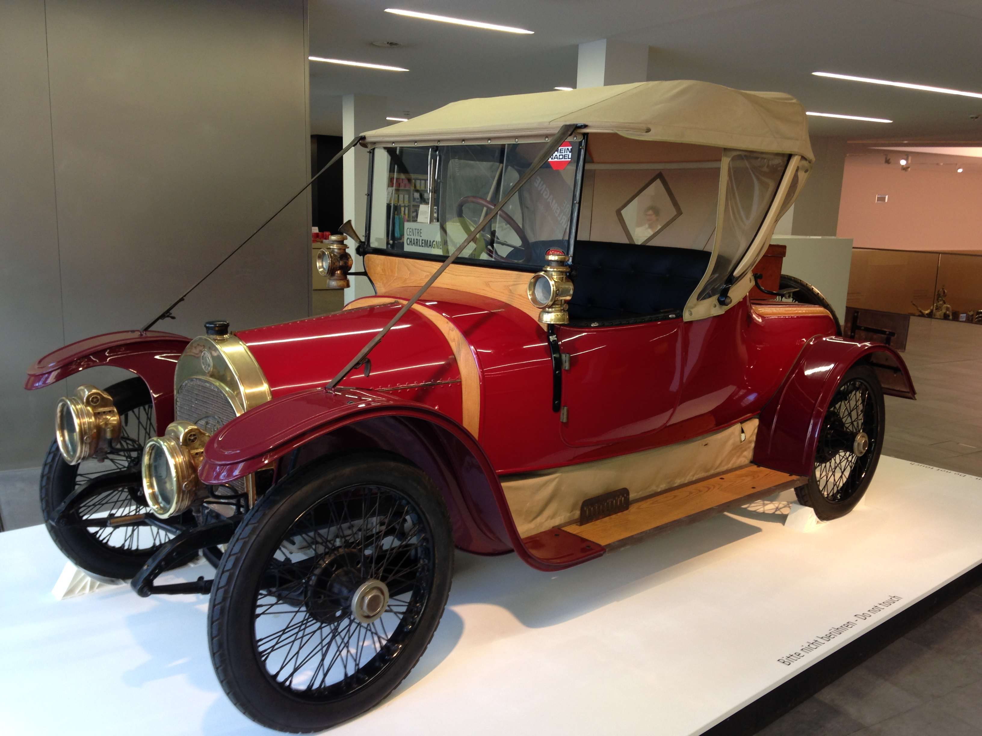 Fafnir Typ 471 Cabriolet, Bj. 1911 R4; 22-27 kW (30-36 PS); 2,3 l Hubraum